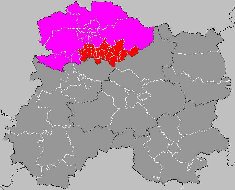 Localisation du canton de Verzy